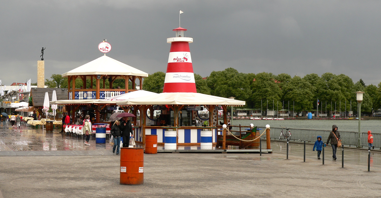 Maschseefest Nordufer